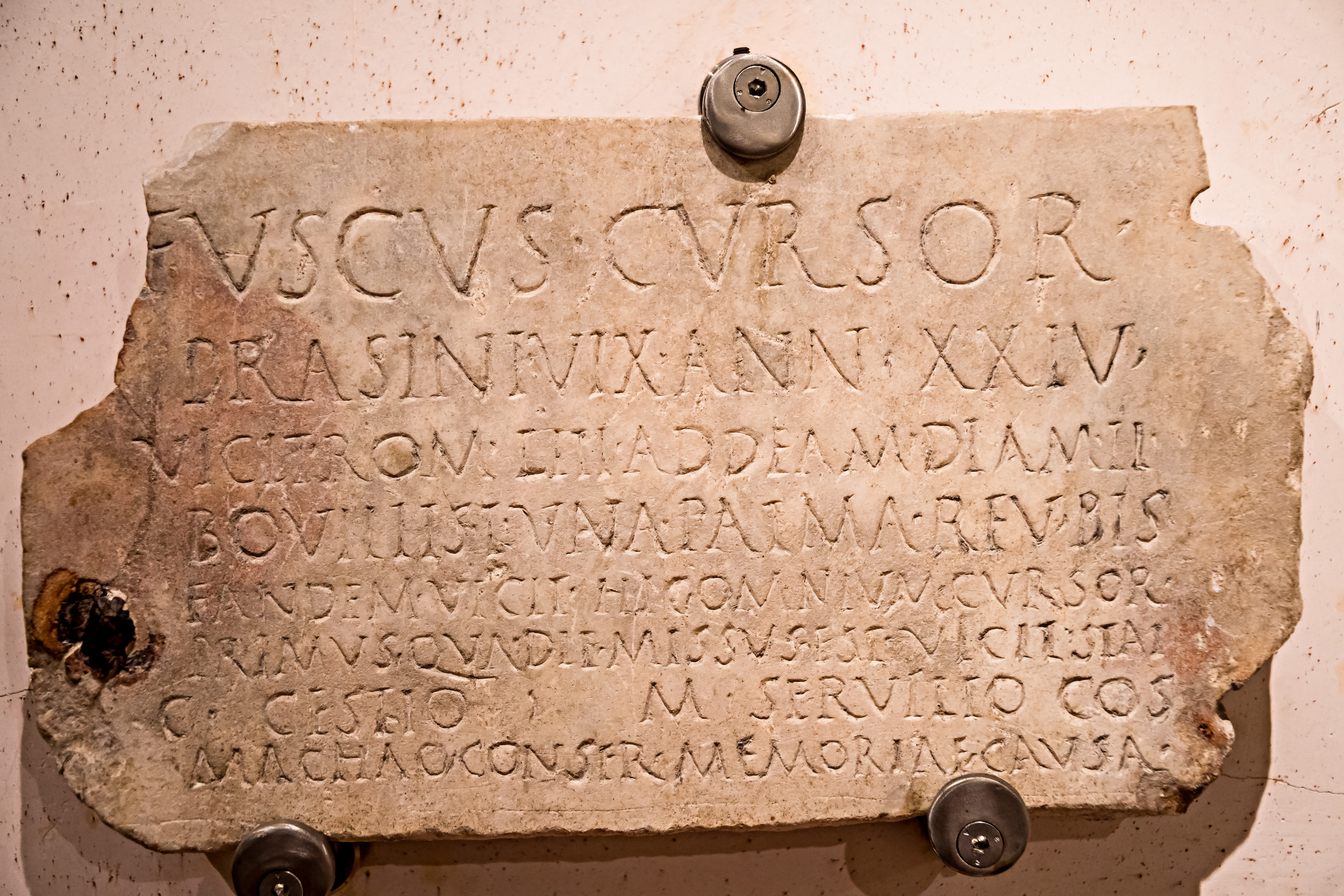 Die Grabplatte von Fuscus, einem römischen Wagenlenker der Grünen Partei, aus der ersten Hälfte des 1. Jahrhunderts. Er starb mit 24 Jahren und hatte zahlreiche Siege errungen. Seinen ersten Sieg errang er bei seinem ersten Rennen